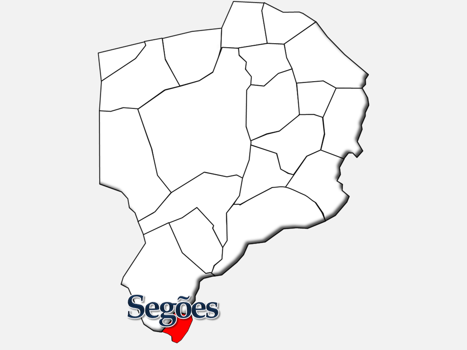 Mapa das freguesias